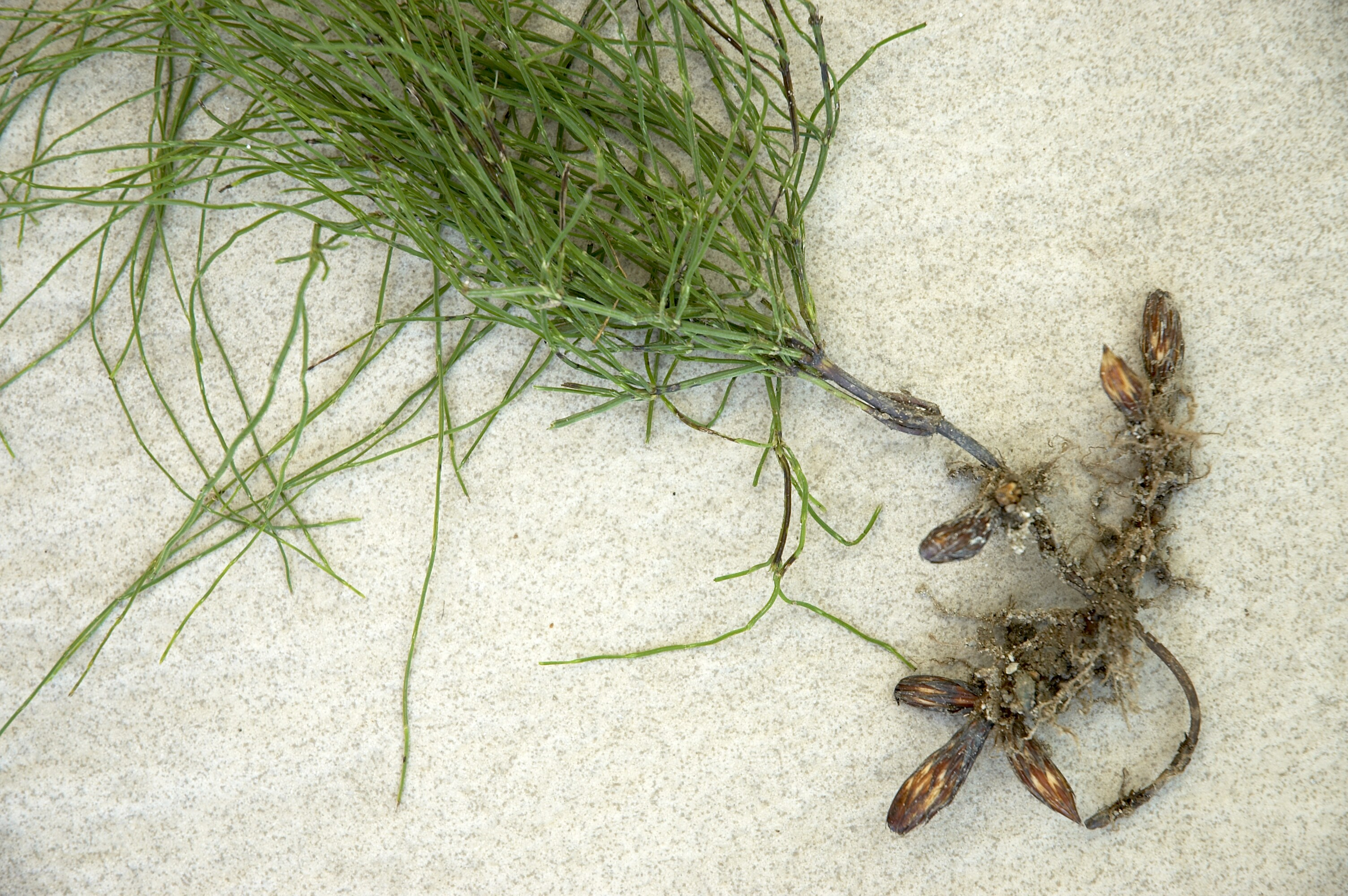 Equisetum arvense